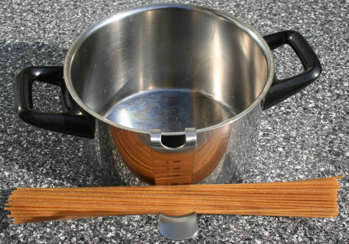 Pastamaß